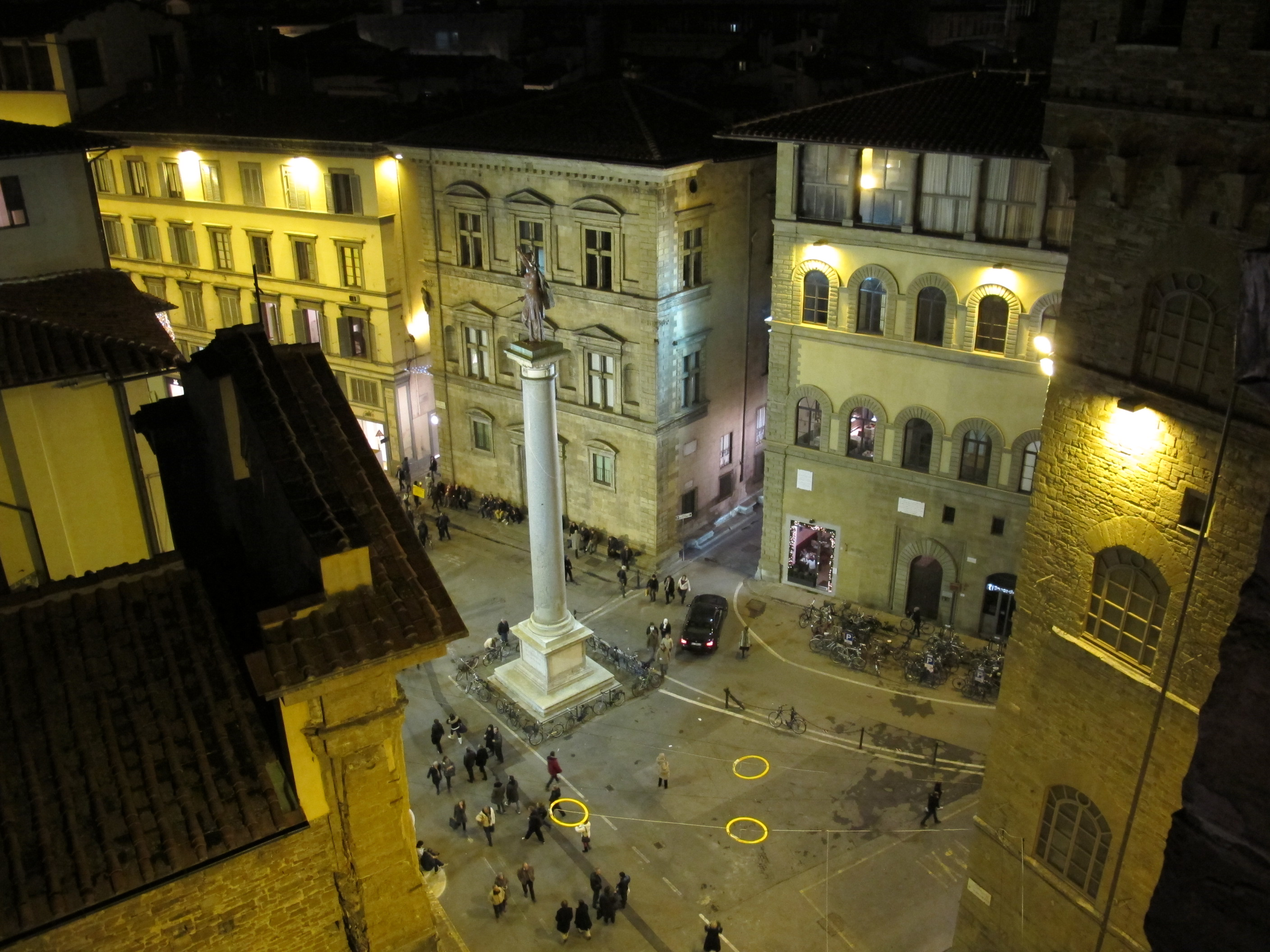 Piazza santa trinita di notte